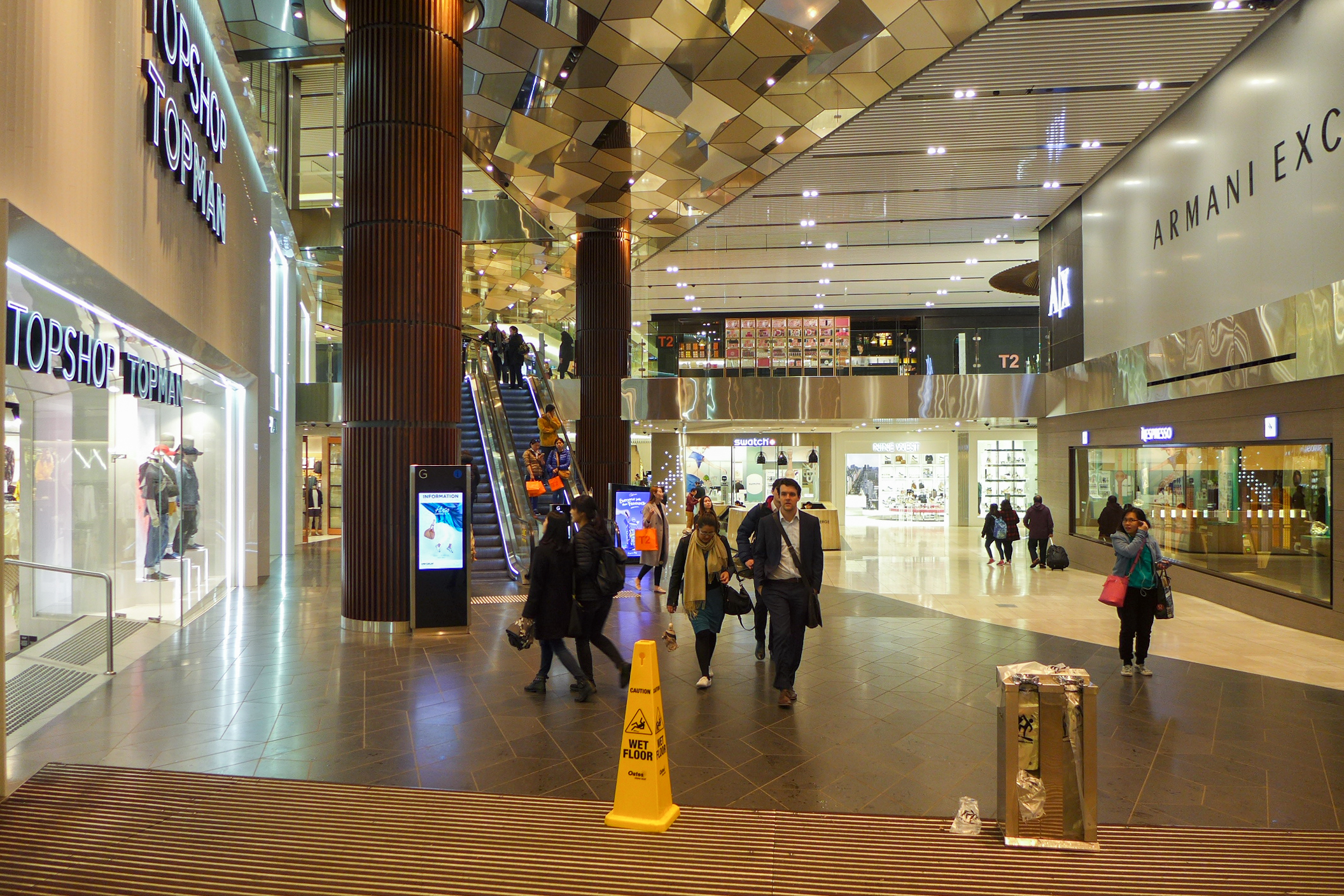 Emporium Melbourne Entrance